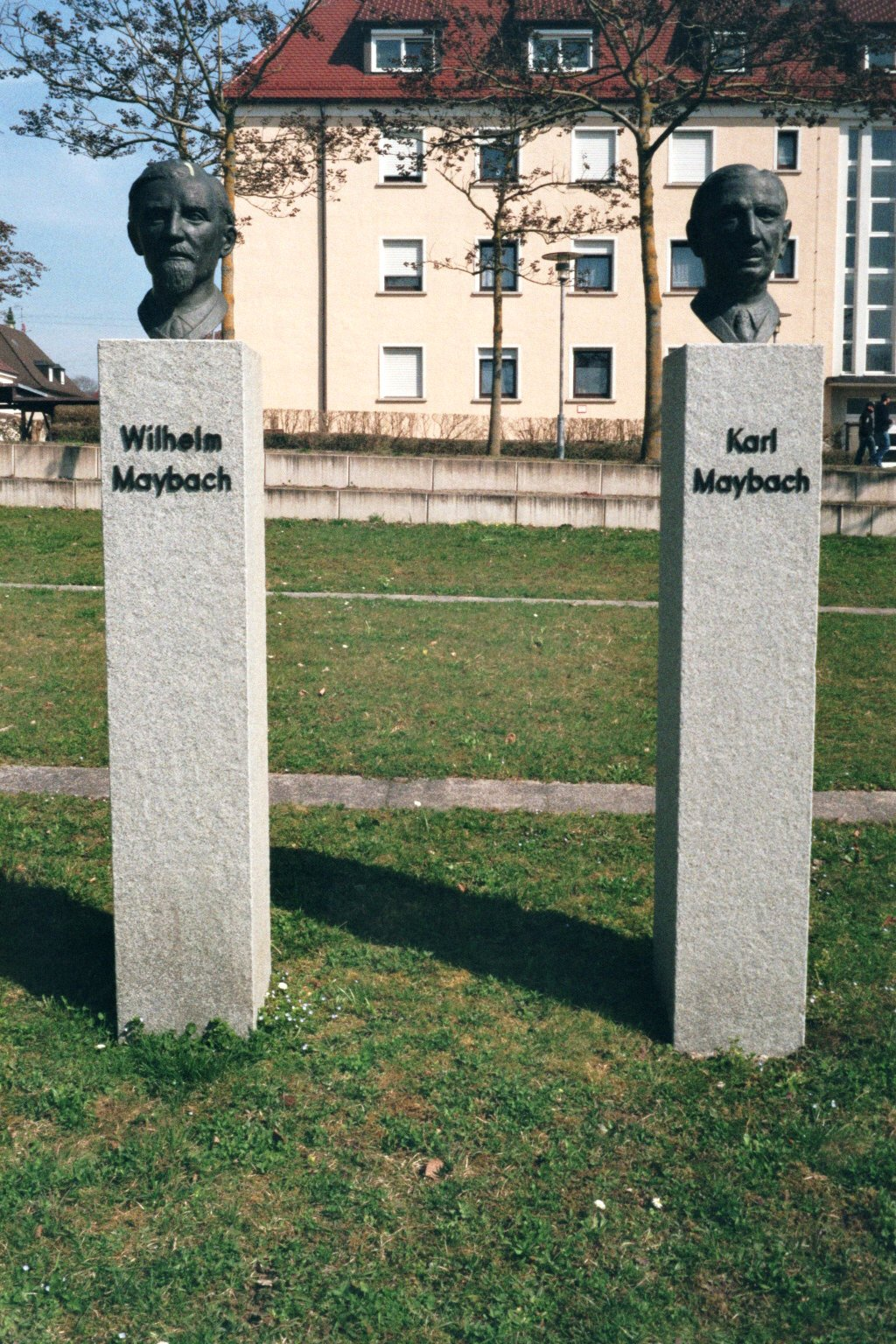 Maybach-Stelen. Erstellt: 2002. Standort: Maybachplatz, Friedrichshafen.